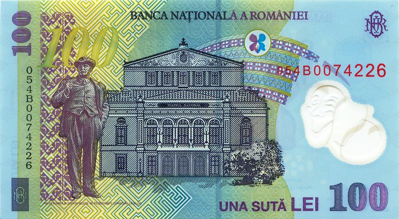 100 Leu reverse